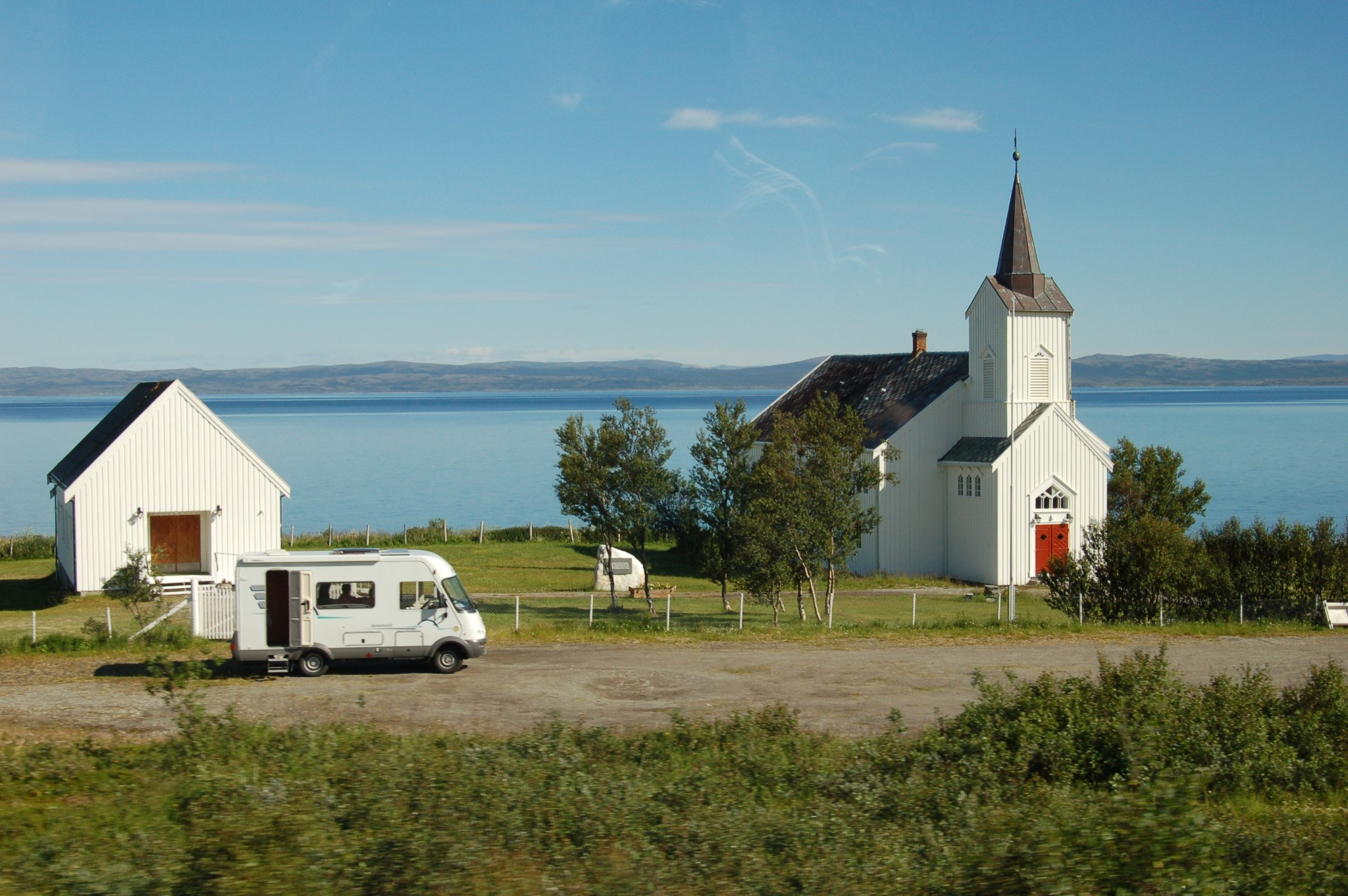 Kistrand kirke (church) in Porsanger, Norway